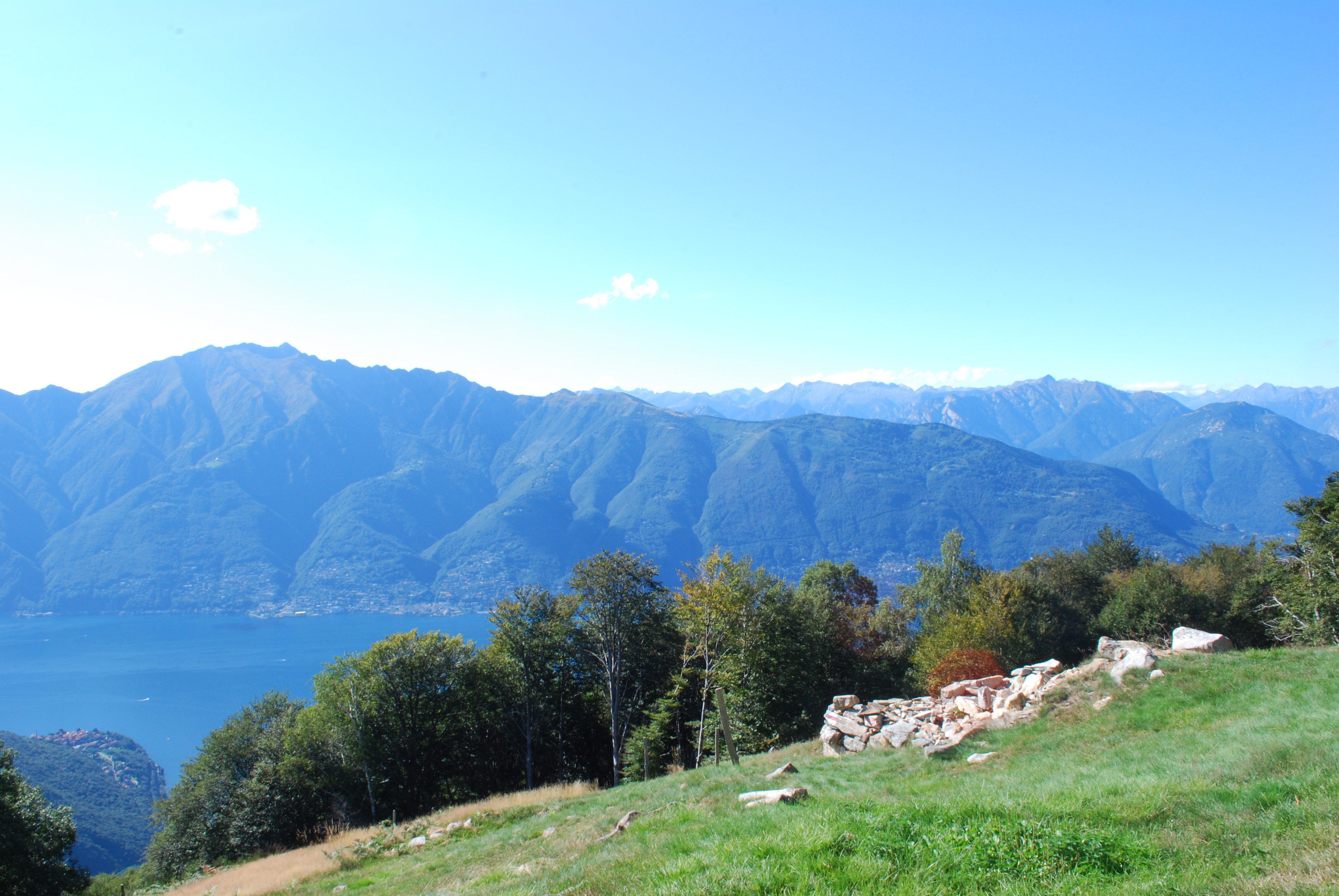 Vista sul lago Maggiore dall'alpetto Caviano